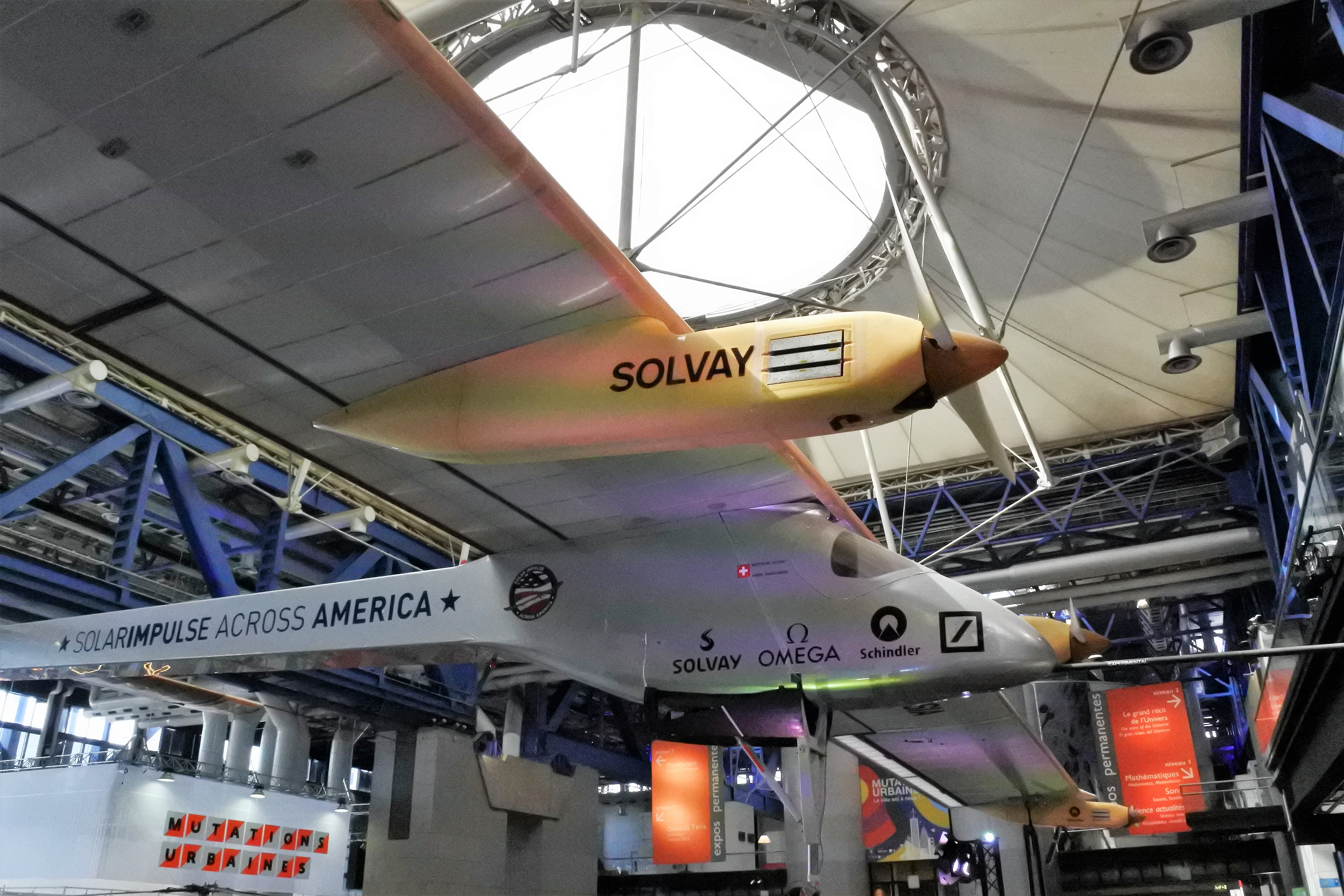 Solar Impulse fut en 2010 le premier avion capable de voler, de jour comme de nuit, sans aucun carburant, propulsé uniquement par l'énergie solaire.Photo prise dans la Cité des sciences et de l'industrie de Paris.